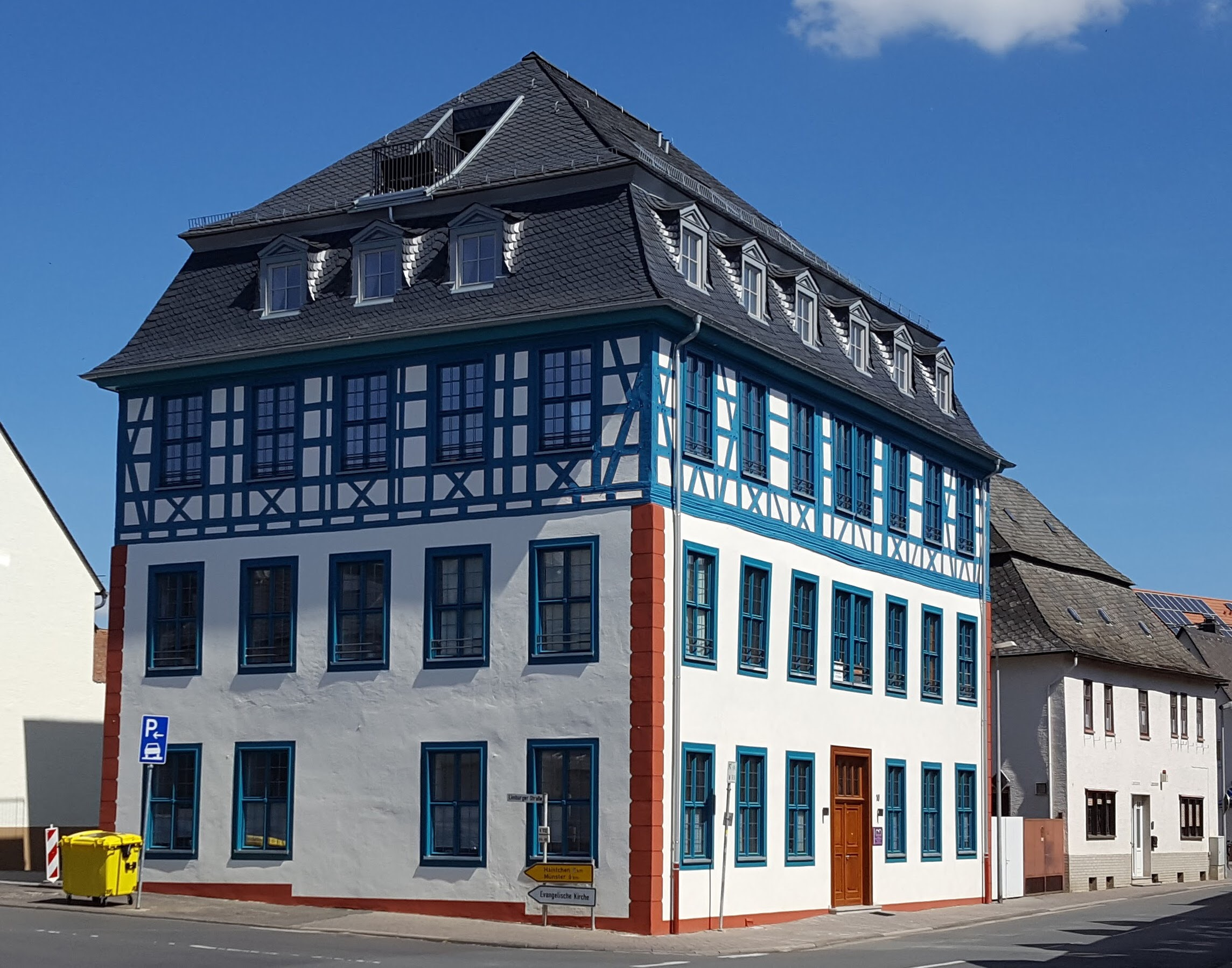 Römischer Kaiser in Niederselters 2016